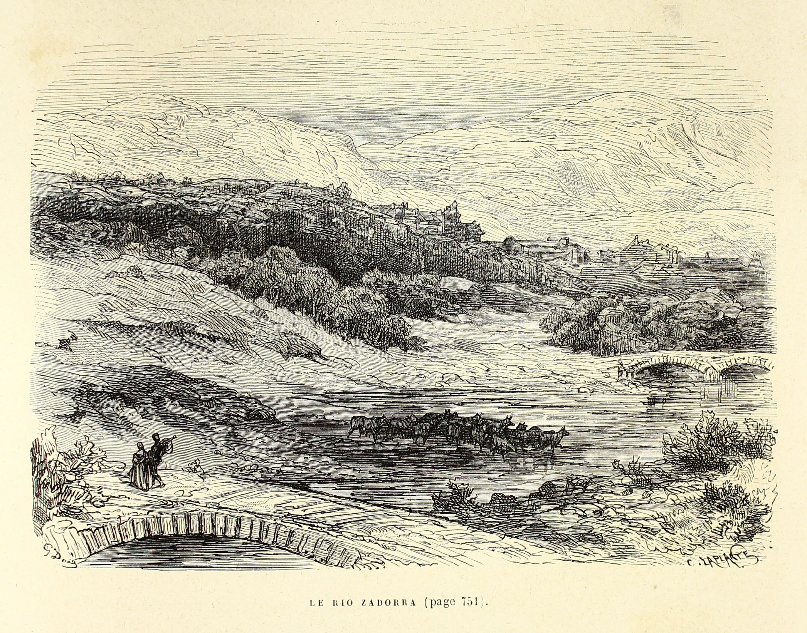 Autor: Davillier, Jean Charles, barón, 1823-1883 Descripción bibliográfica: L'Espagne / par Le Baron CH. Davillier ; ilustrée de 309 gravures dessinées su bois par Gustave Doré. - Paris : Librairie Hachette, 1874. - 799 p. : il. Materia: España- Geografía Materia: España- Usos y costumbres Ilustrador: Doré, Gustave, 1832-1883 Editor: Libreria Hachette Lugar de impresión: Francia, París Localización: Libro completo